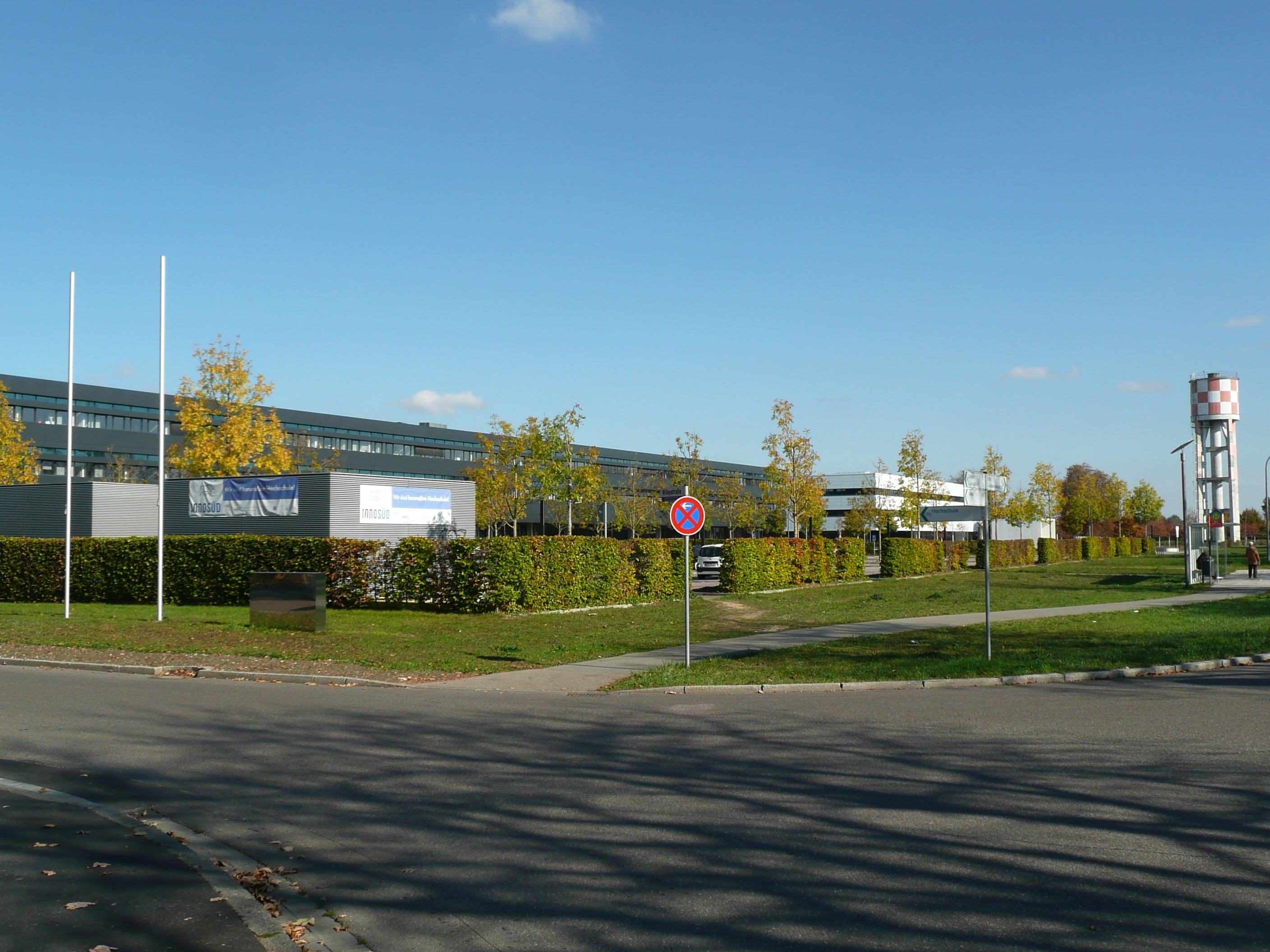 Hauptgebäude und das 2018 neu eröffnete Erweiterungsgebäude sowie der Wiley-Wasserturm